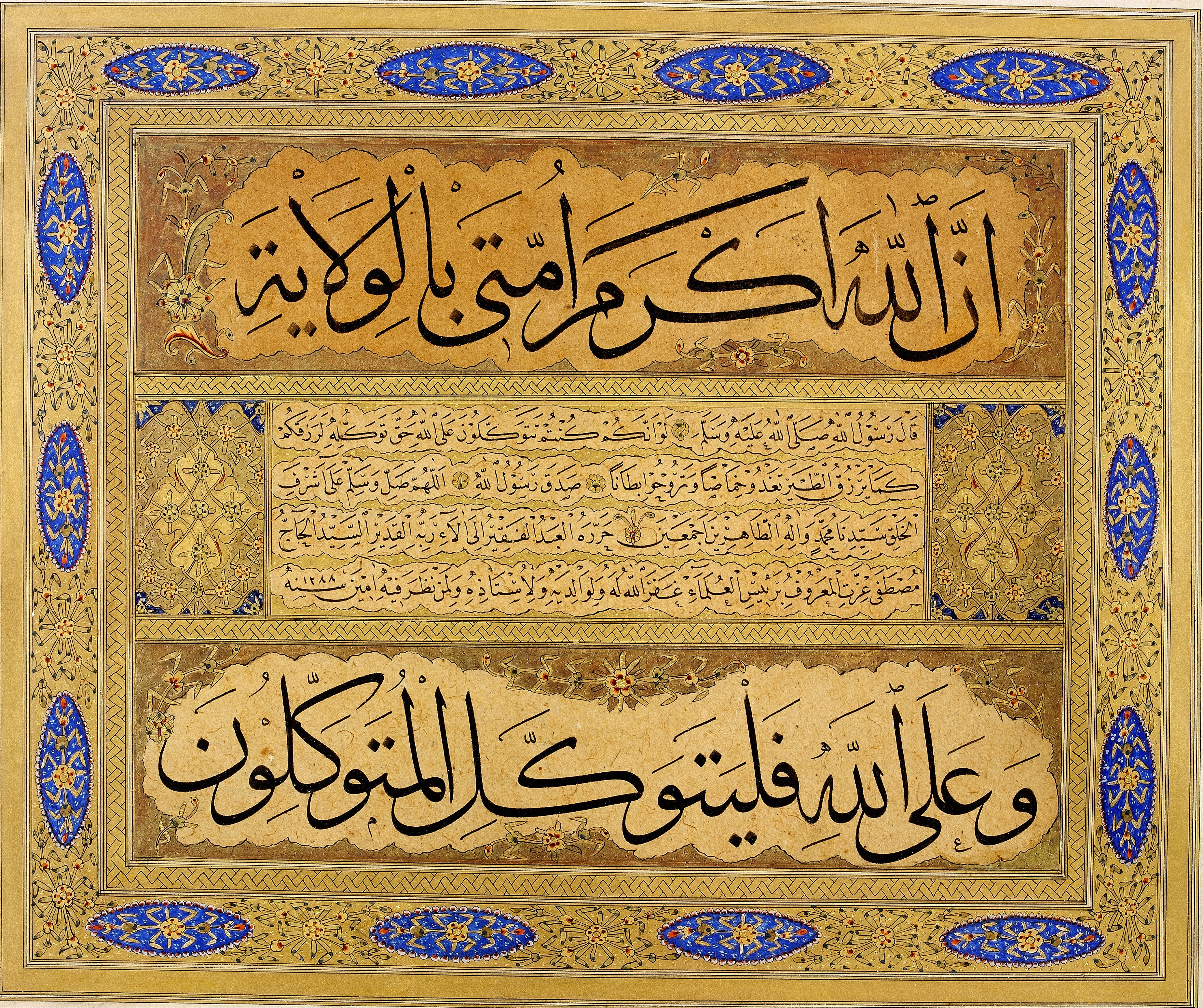 Top Arabic line reads: ان الله أكرم أمتي بالولاية